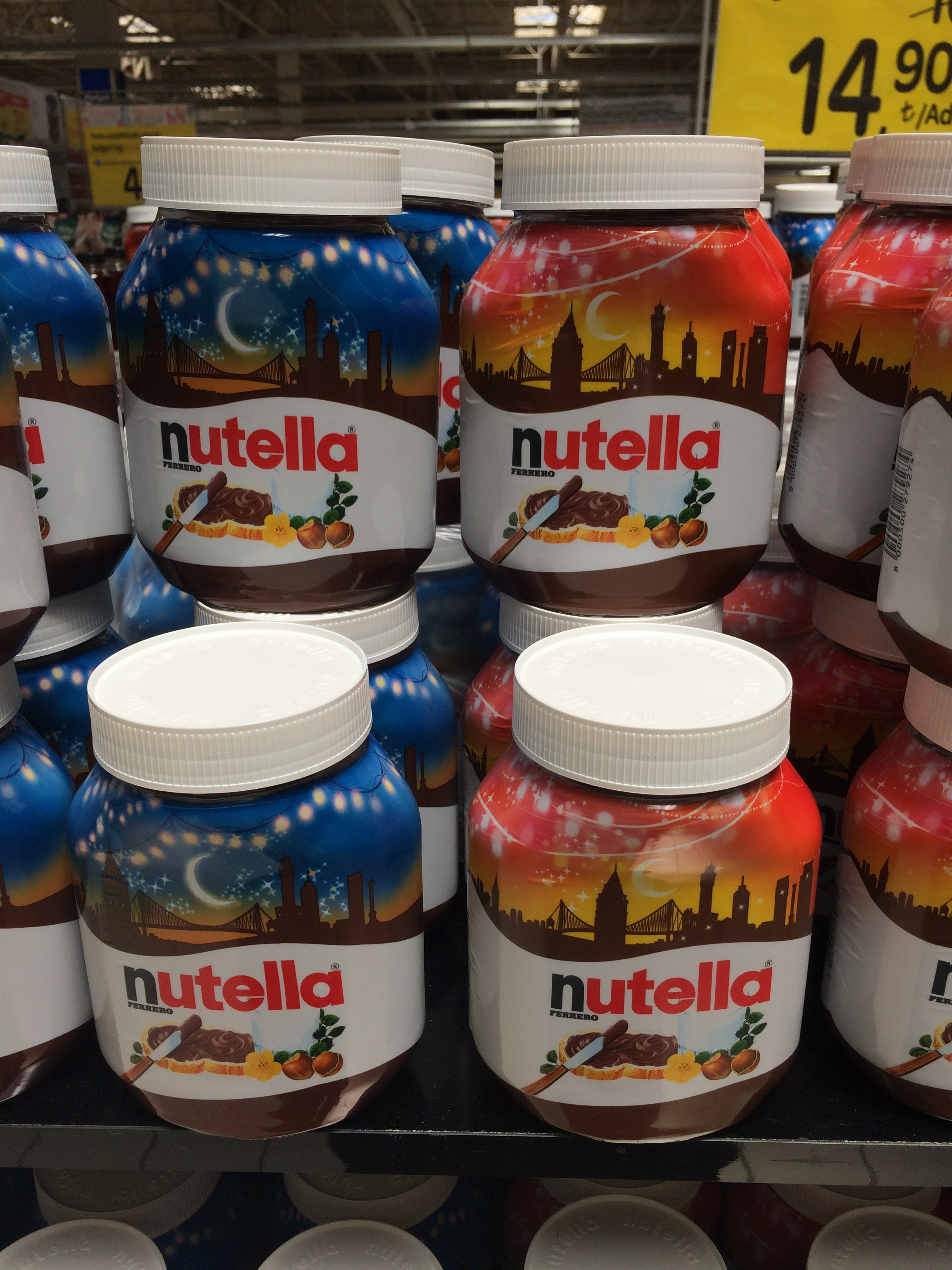 Maghrib & Isha time special Ramadan Nutella Jar